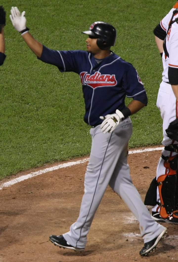 Andy Marté